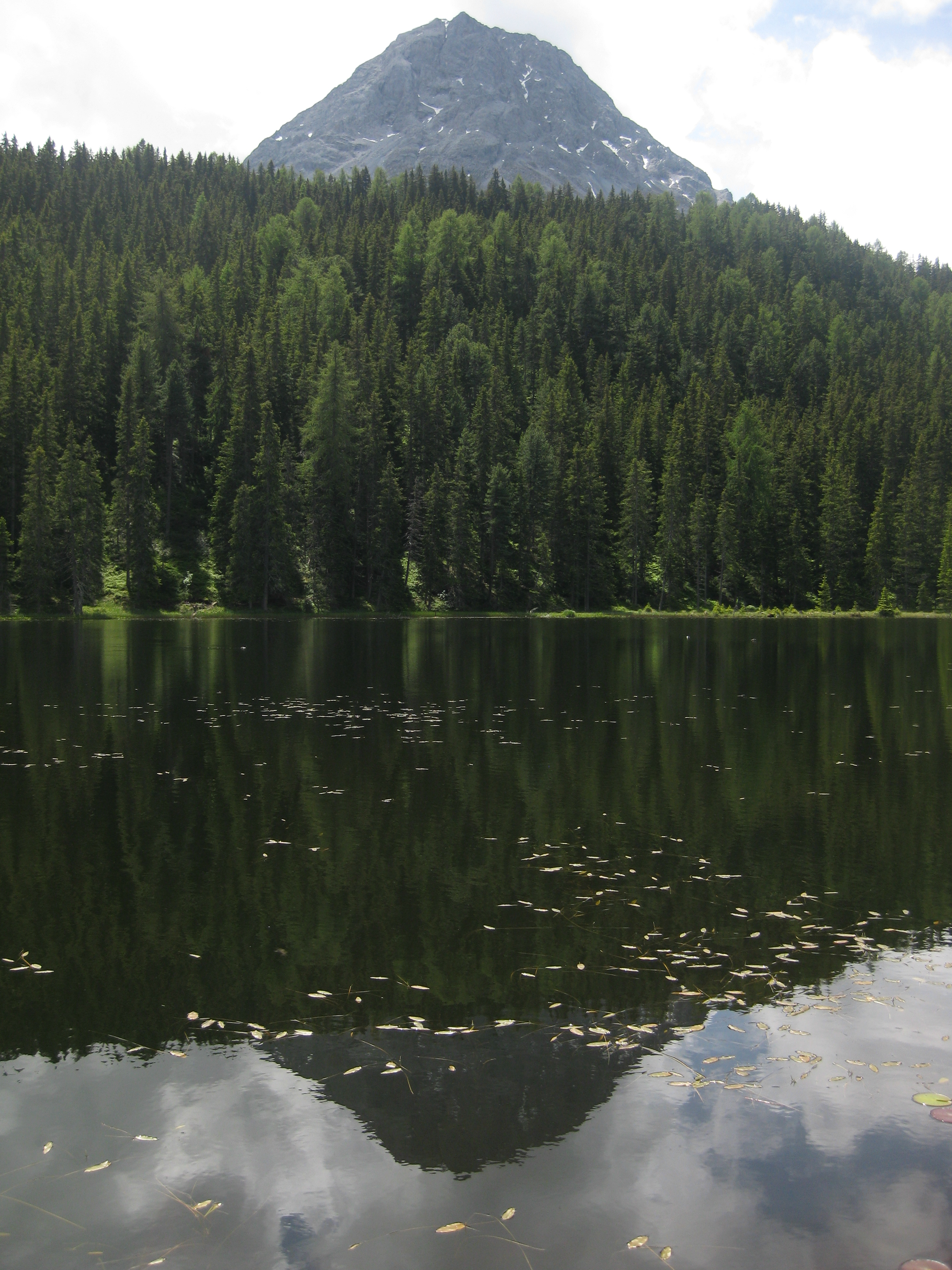 Der "schwarze See" in der Nähe von Nauders am Reschenpass. This media shows the natural monument in the Tyrol with the ID ND_6_4.